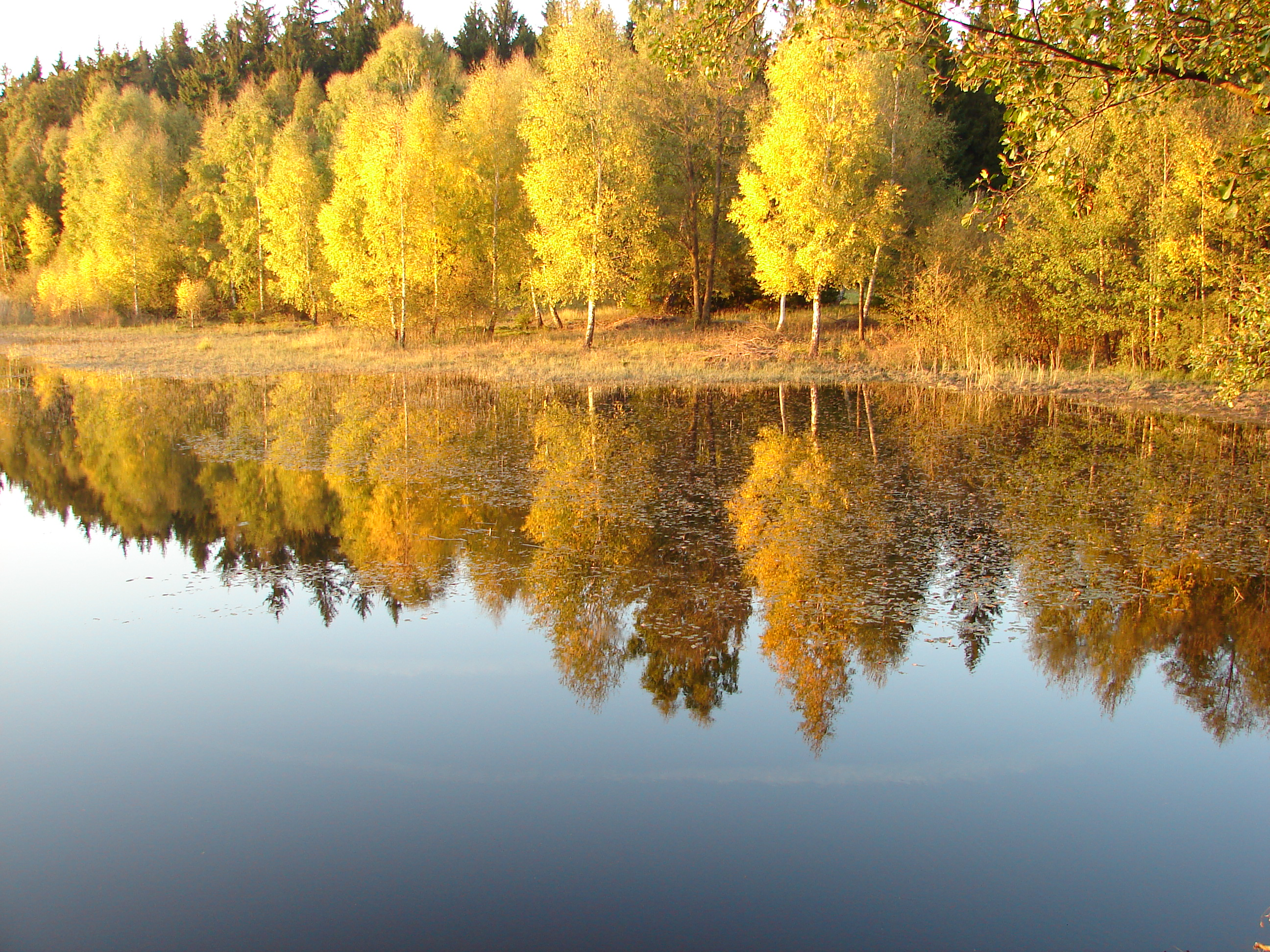 NPR Zhejral - litorál v jižní části rybníka